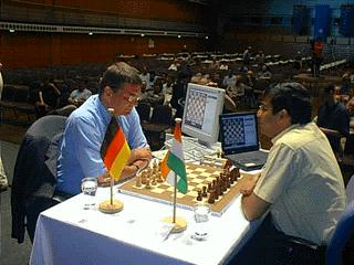 Jens Beutel und Viswanathan Anand spielen auf der Bühne in der Rheingoldhalle Mainz, anläßlich der Chess Classic 2002.